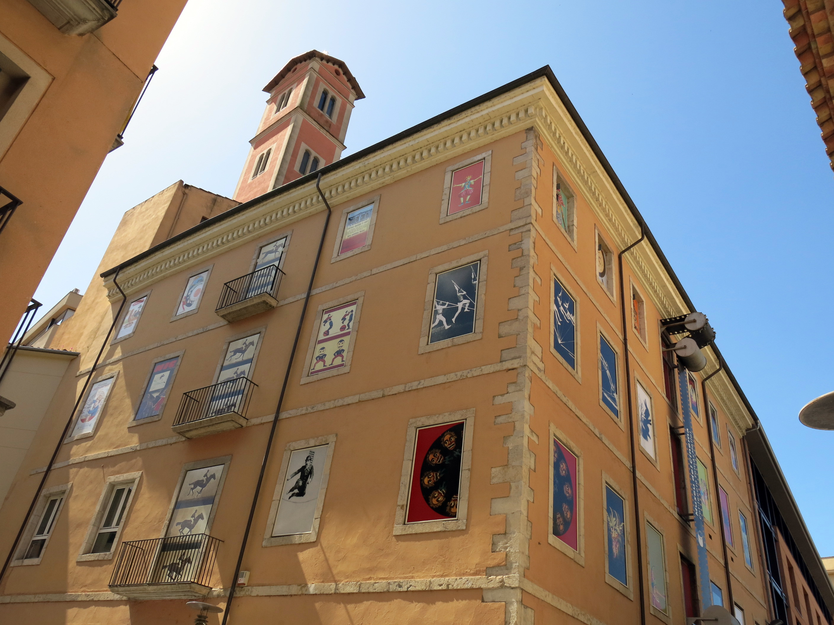 Torre de les Aigües (Girona)